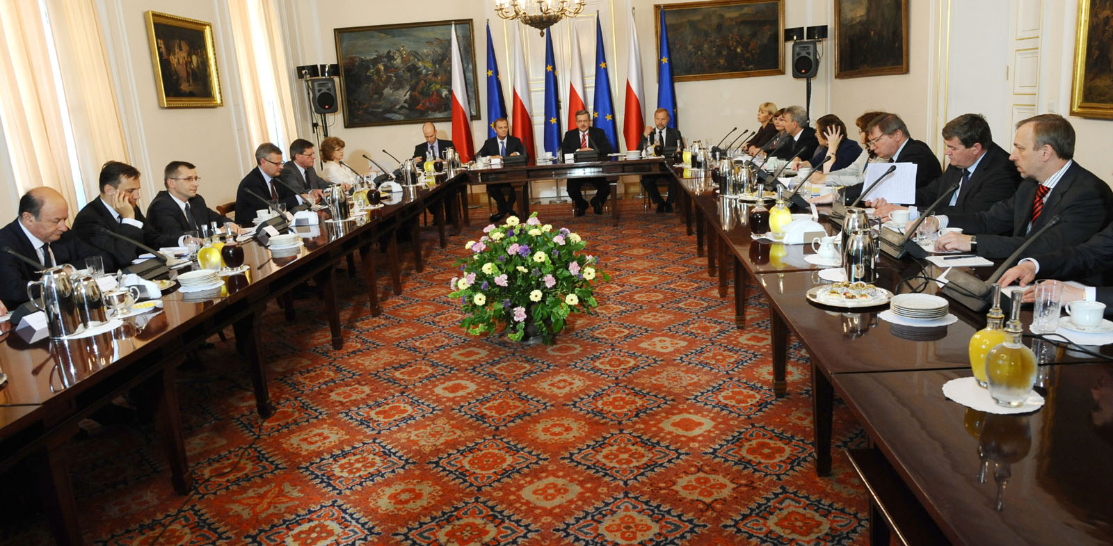 10.06.2010, Rada Gabinetowa, Warszawa.